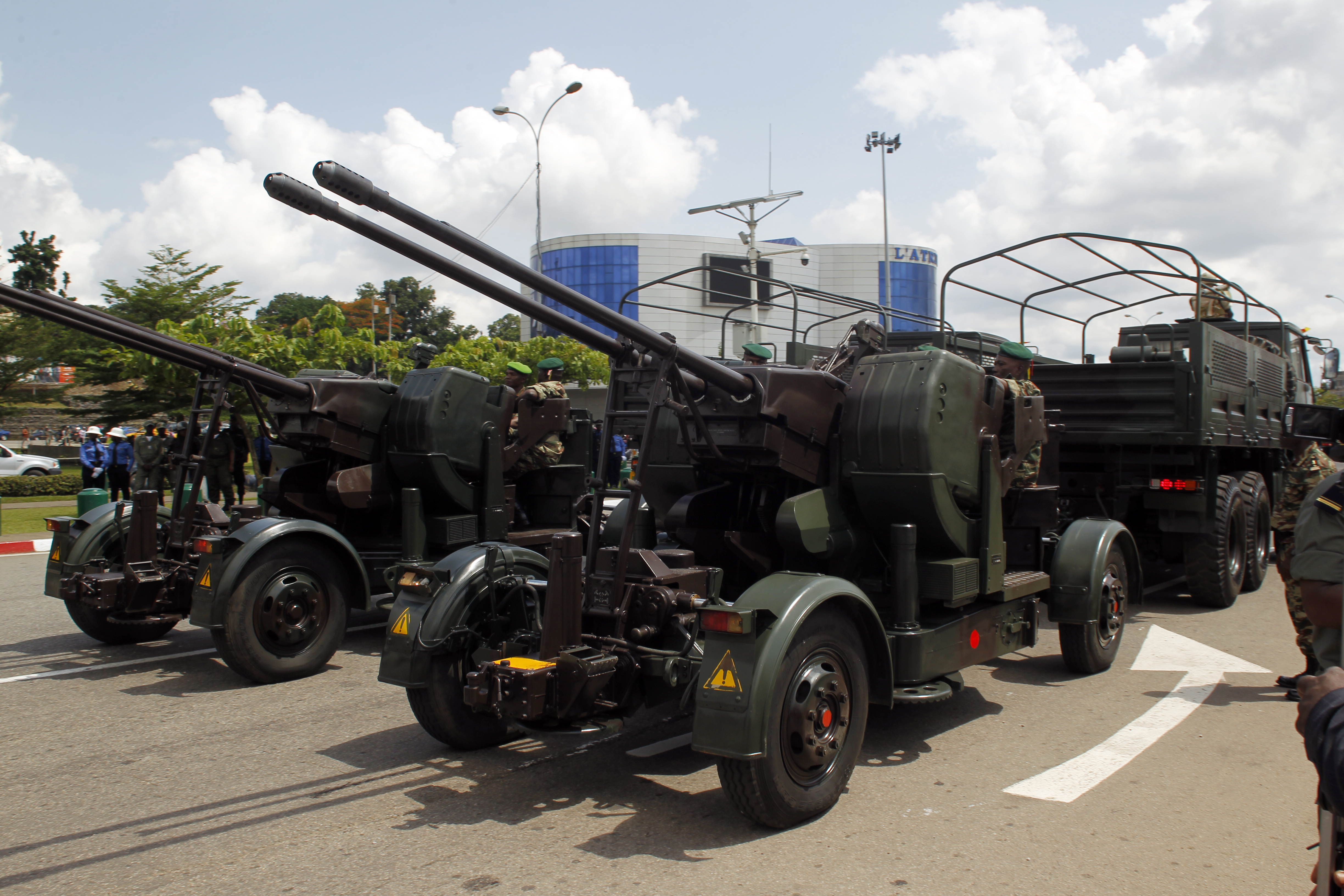 véhicules transportant le matériel militaire pendant le défilé de la fête national du Cameroun le 20 mai 2019. This is an image with the theme "Africa on the Move or Transport" from: Cameroon